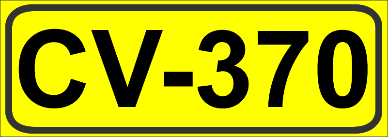 Indicador carretera CV370